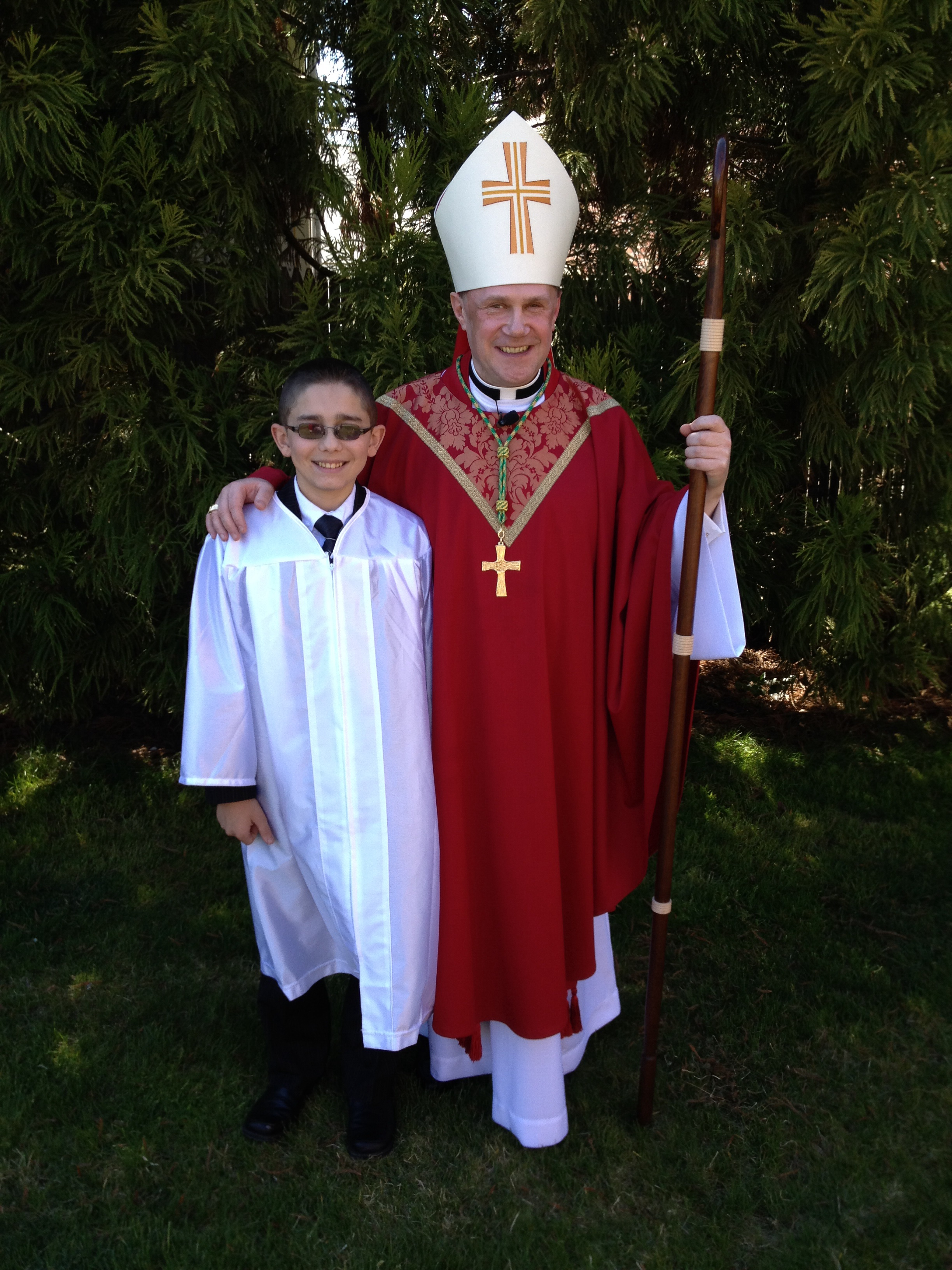 Most Revered Andrzej Jerzy Zglejszewski with Michael C Greco following his confirmation.